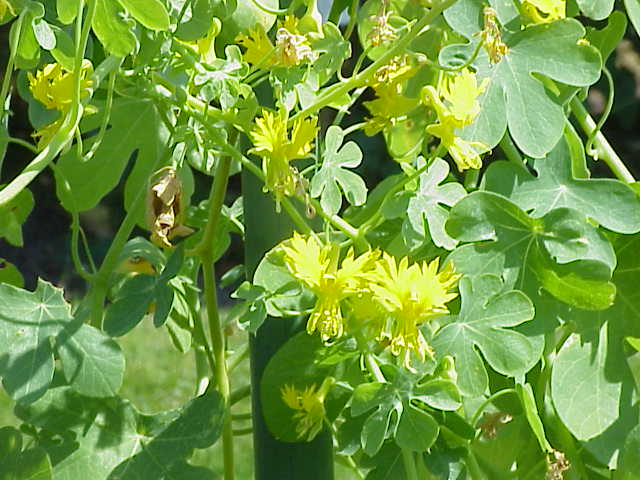 Species: Tropaeolum peregrinum (var. peregrinum) Family: Tropaeolaceae Image No. 3